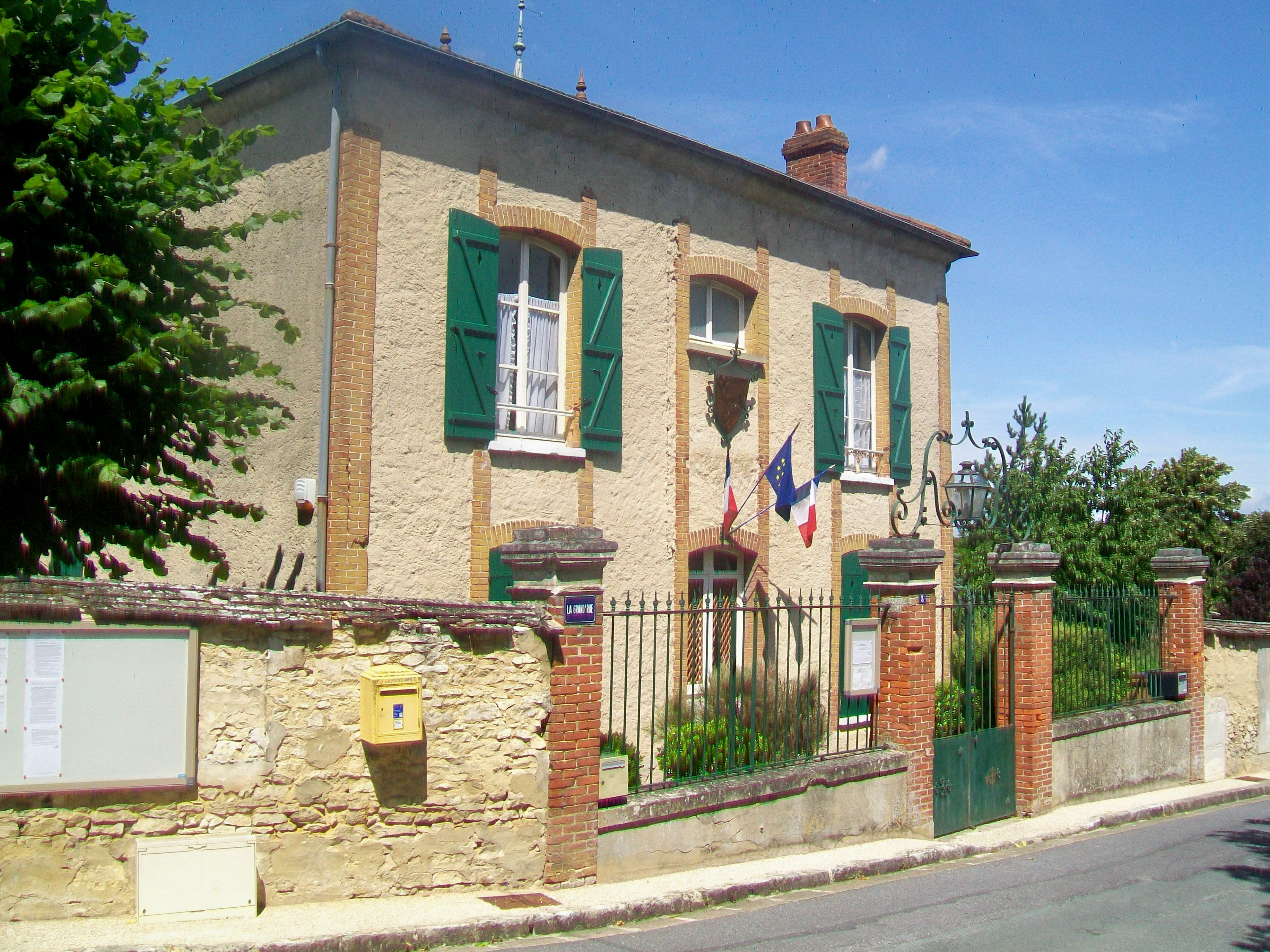 La mairie, sur la Grande-rue.